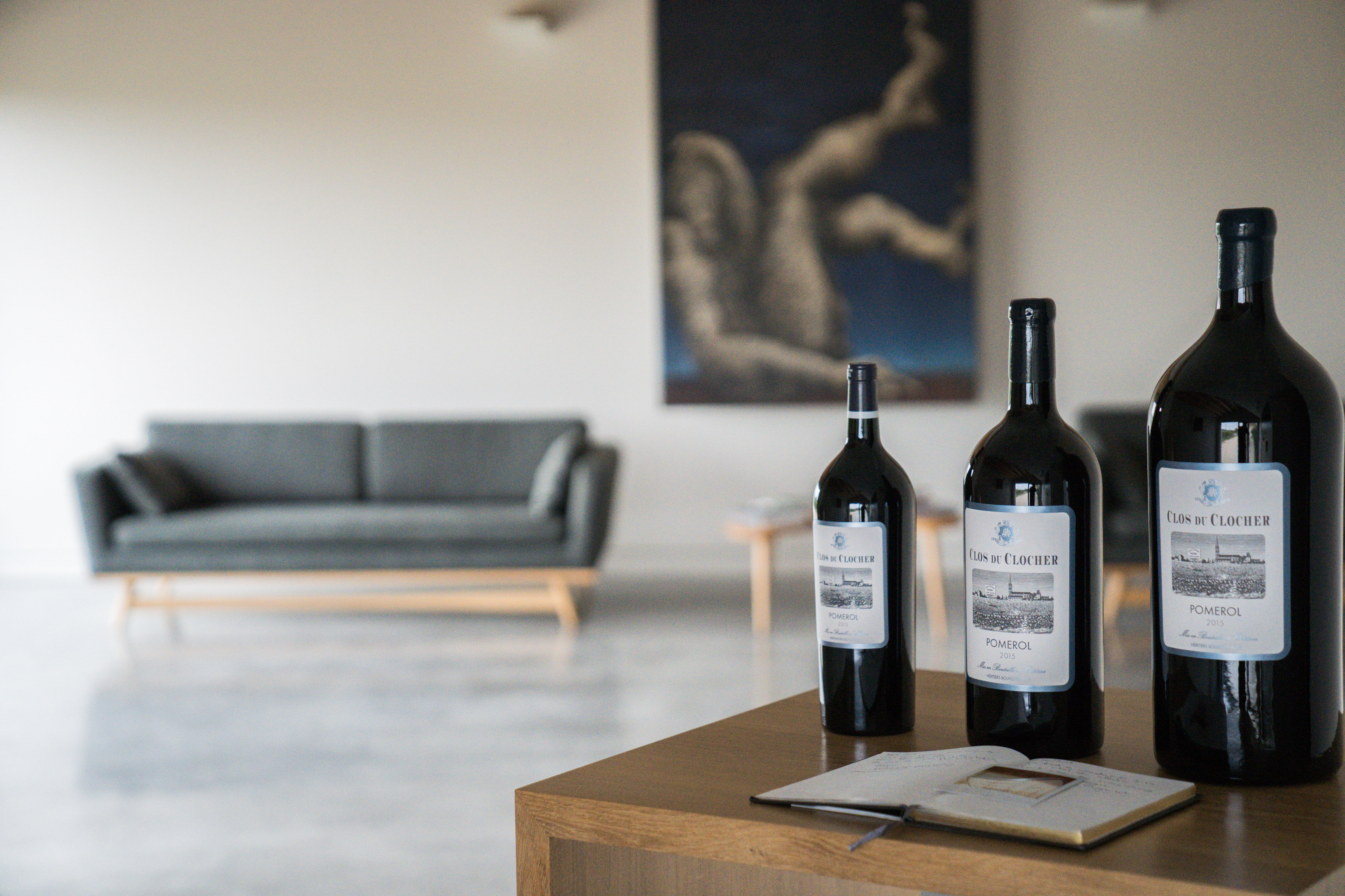 Le chai du Clos du Clocher en 2019